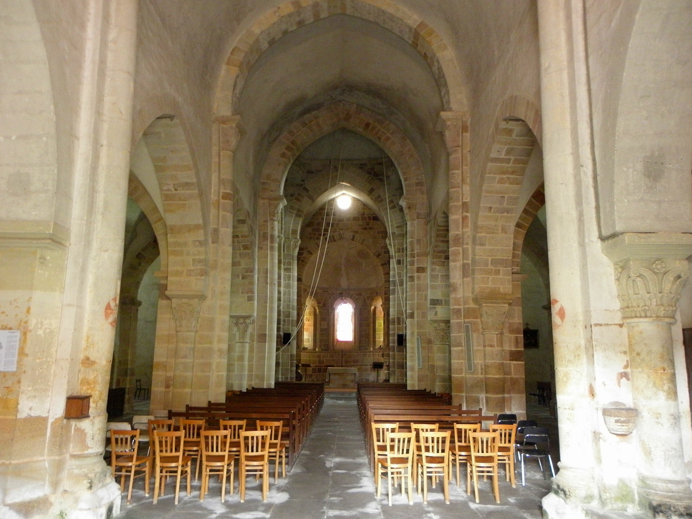 Église Saint-Étienne de FRanchesse (03). Vue intérieure. .